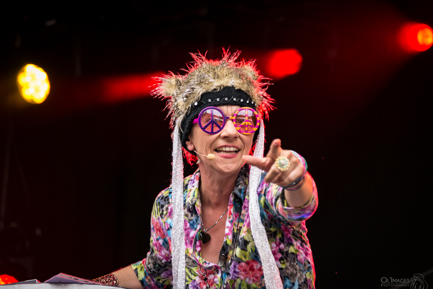 Billy Ze Kick au ParkRock Festival de Baudour, 2015